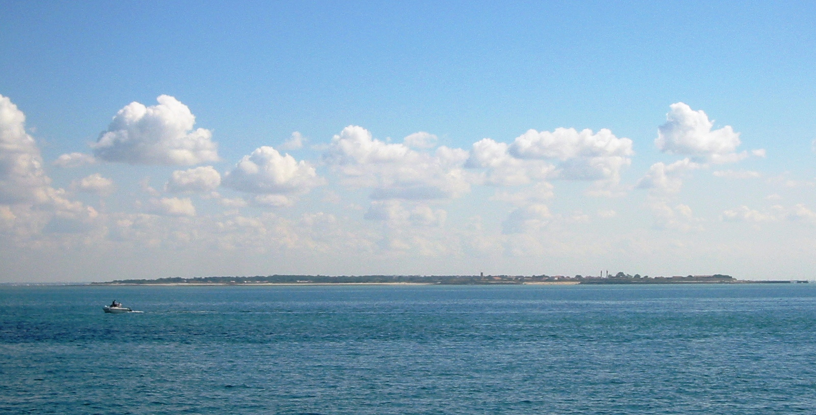 Ile d'Aix, France.